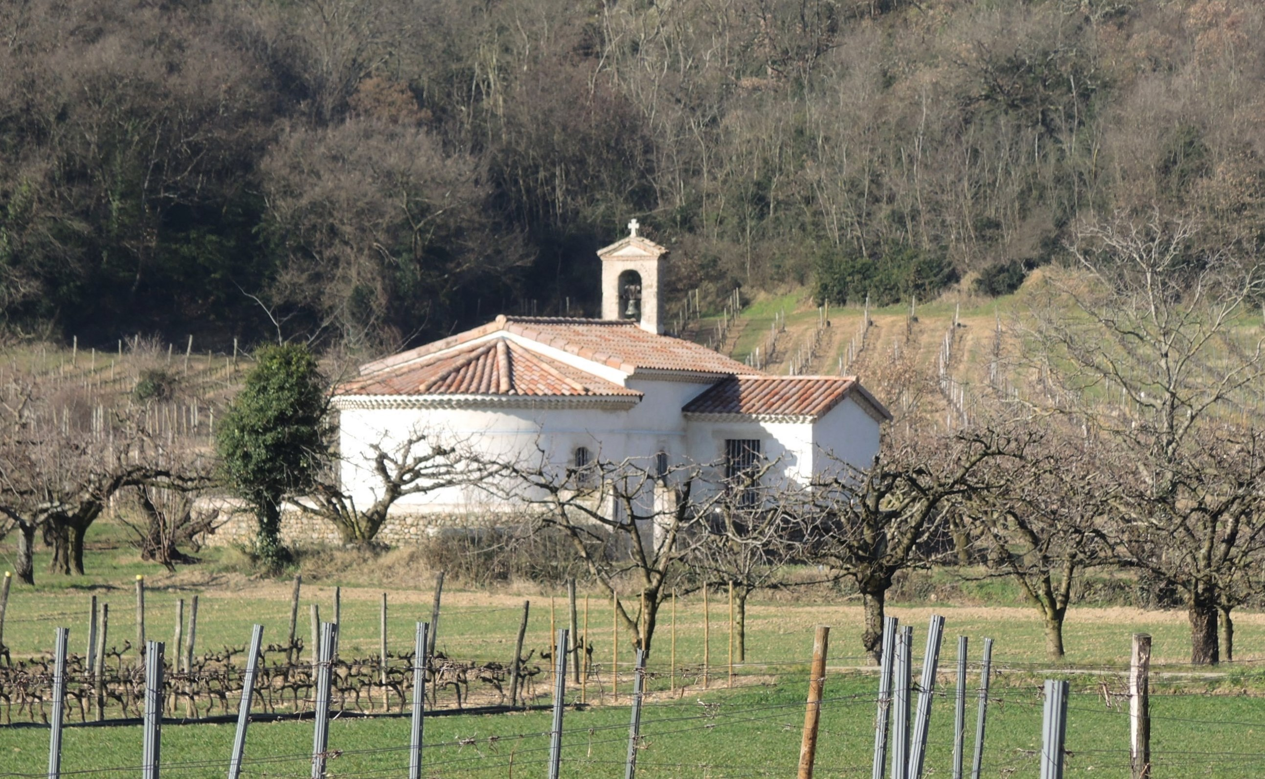 Andance vue générale et détails